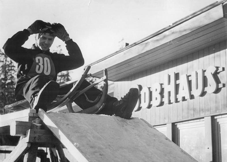 Zentralbild TBD-Wlocka-Schaar-2742 27.1.1955-DDR-Wintersportmeisterschaften 1955 in Oberhof-Am 26.1.1955 wurden auf der Wadsberg-Bobbahn in Oberhof die DDR-Rennschlittenmeisterschaften ausgetragen. UBz: Werner Ackermann von Medizin Friedrichroda errang mit einem neuen Bahnrekord (1:37,390 Min.) den DDR-Meistertitel.